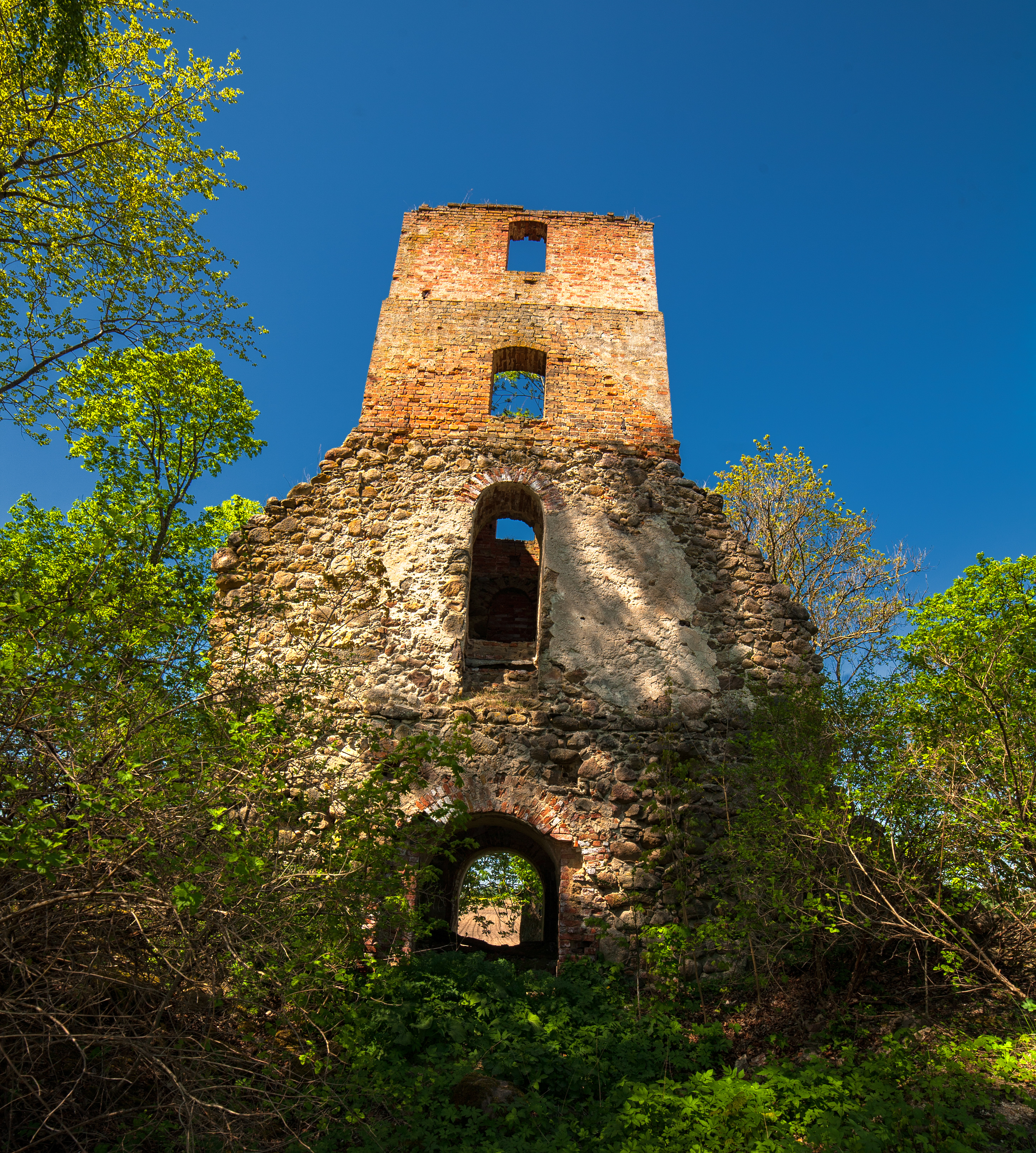 Jaunauces luteriskās baznīcas drupas